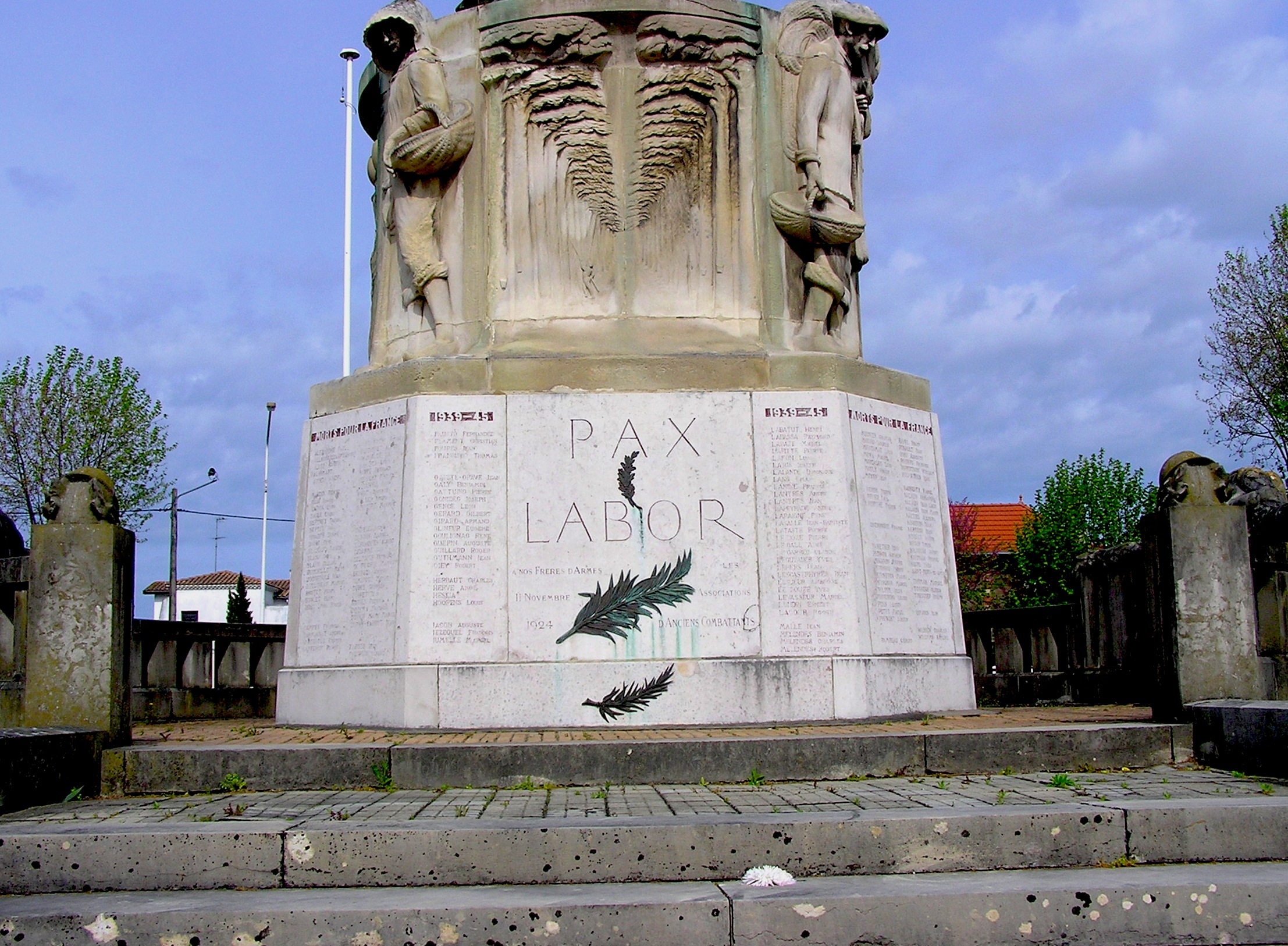 Arcachon en Gironde MAM Paix et Travail